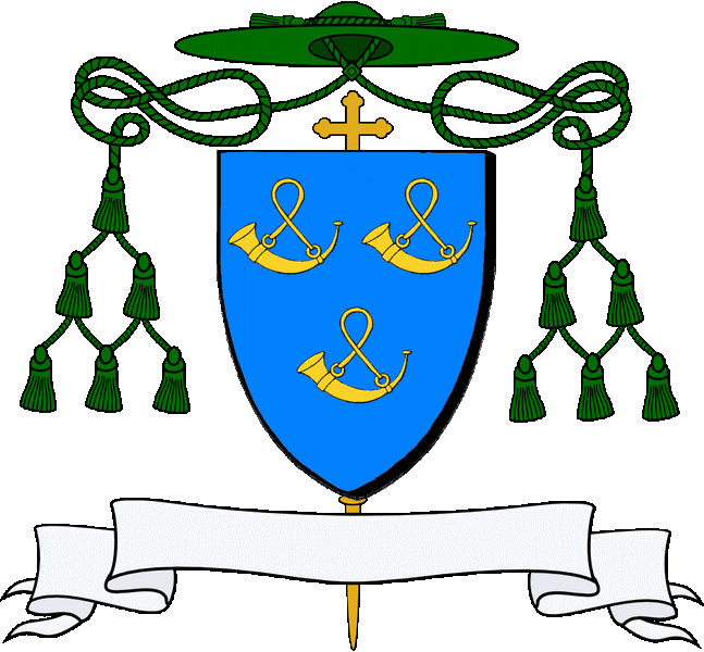 En glazur e zri hucher en aour